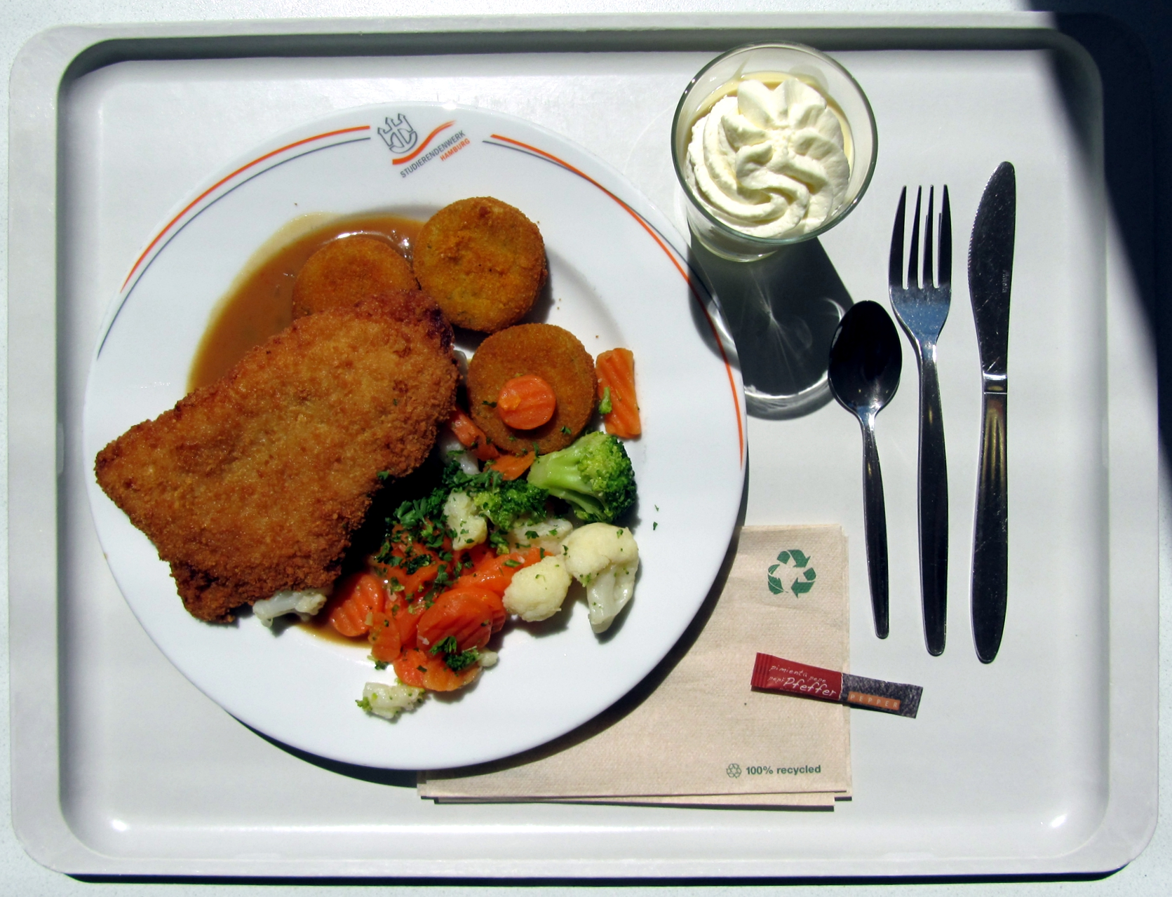 Hauptgericht in der Phil-Mensa der Uni Hamburg am 23. Juni 2016: Schnitzel, Mischgemüse, Kartoffeltaler, Sauce und Vanillepudding mit Sahne als Nachtisch.